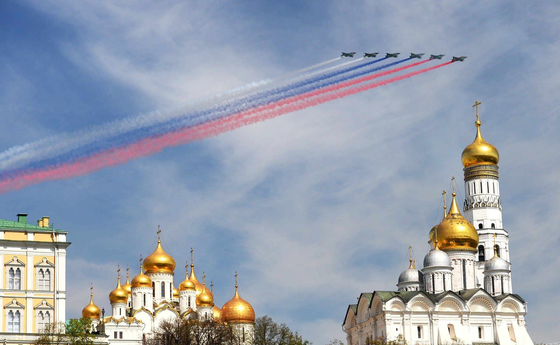 Штурмовики Су-25 во время военного парада в ознаменование 70-летия Победы в Великой Отечественной войне 1941–1945 годов.